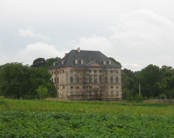 Schloss Rossewitz am Fuß der südlichen Flußterrasse des Recknitzstromtales, einsam gelegen zwischen den Dörfern Recknitz und Liessow. (Landkreis Güstrow, Mecklenburg-Vorpommern)